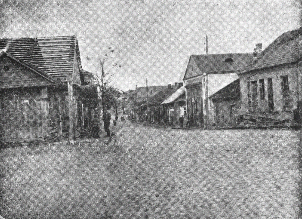 Беларуская (тарашкевіца): Радашкавічы (Radaškavičy), вуліца Менская (vulica Mienskaja)